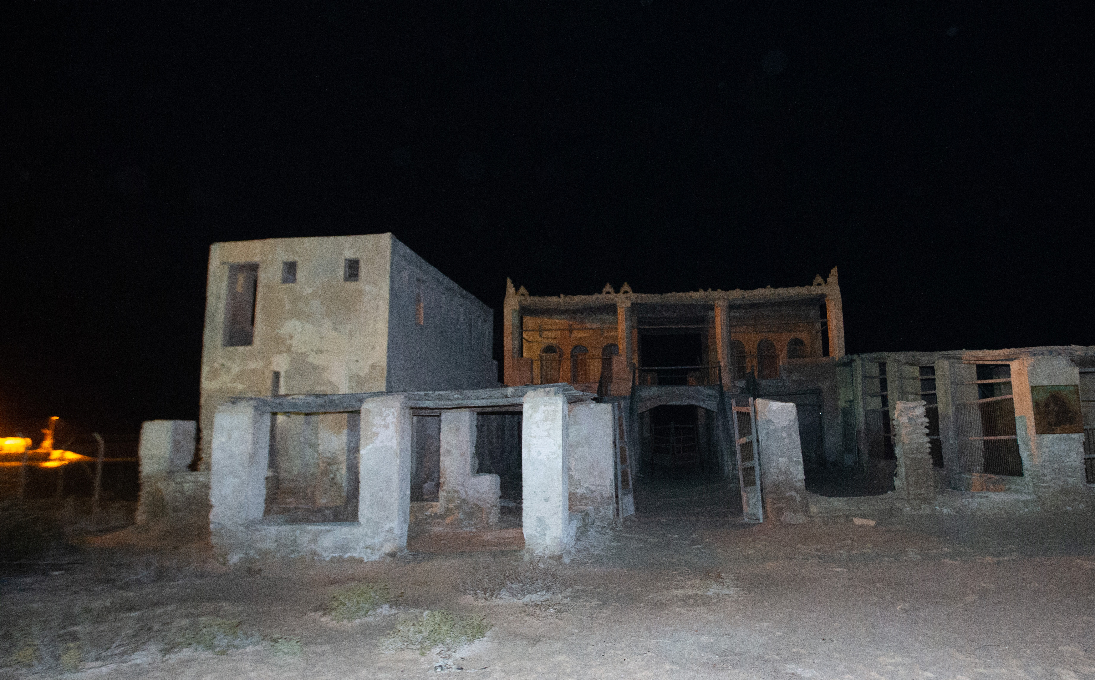 آثار ميناء العقير الباقية في الأحساء